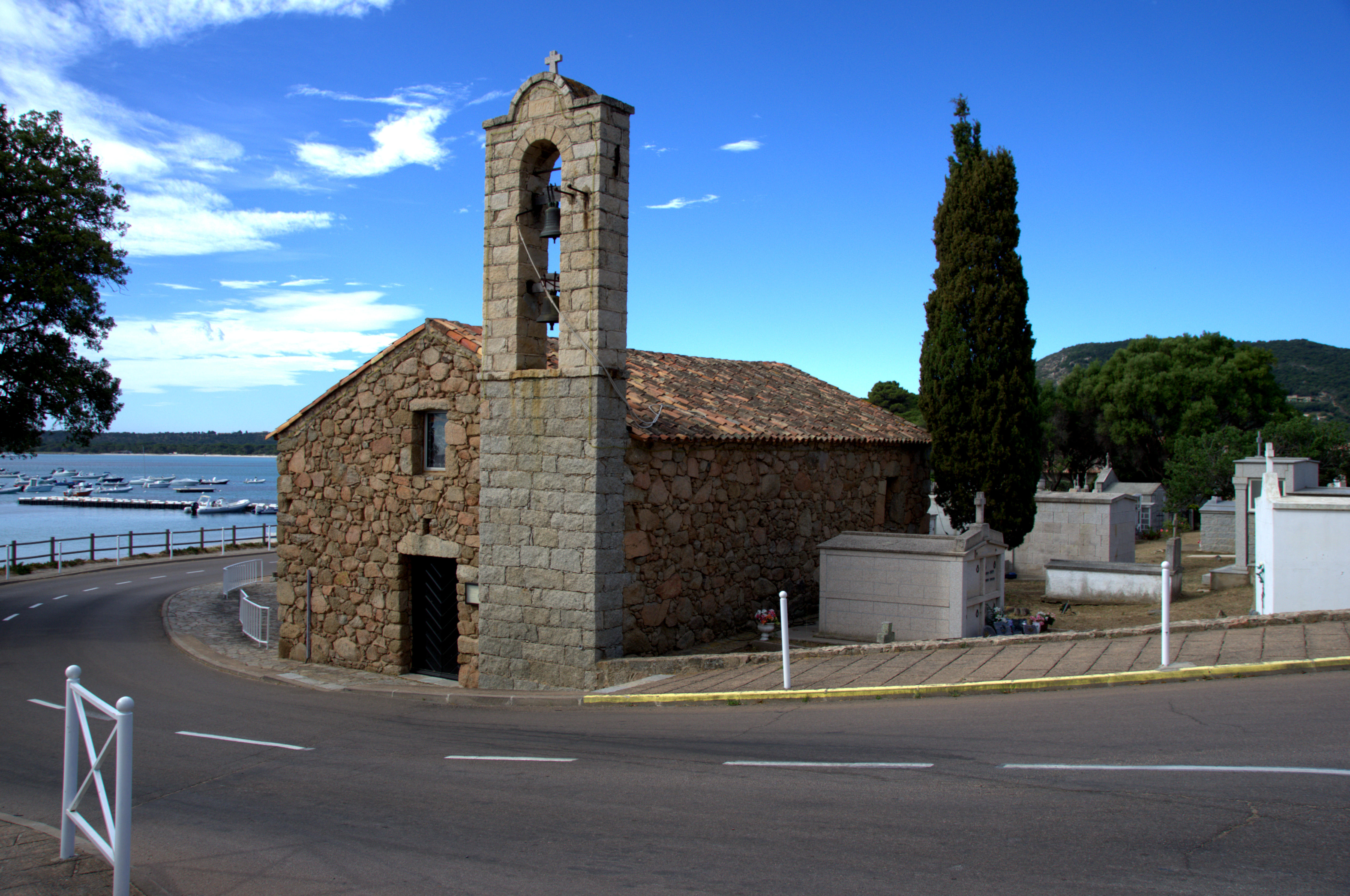 Vue de l'église de Pinarellu